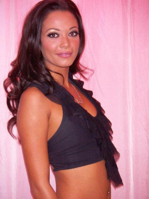 Malezia at AVN Adult Entertainment Expo 2005 on Jan 5, 2005